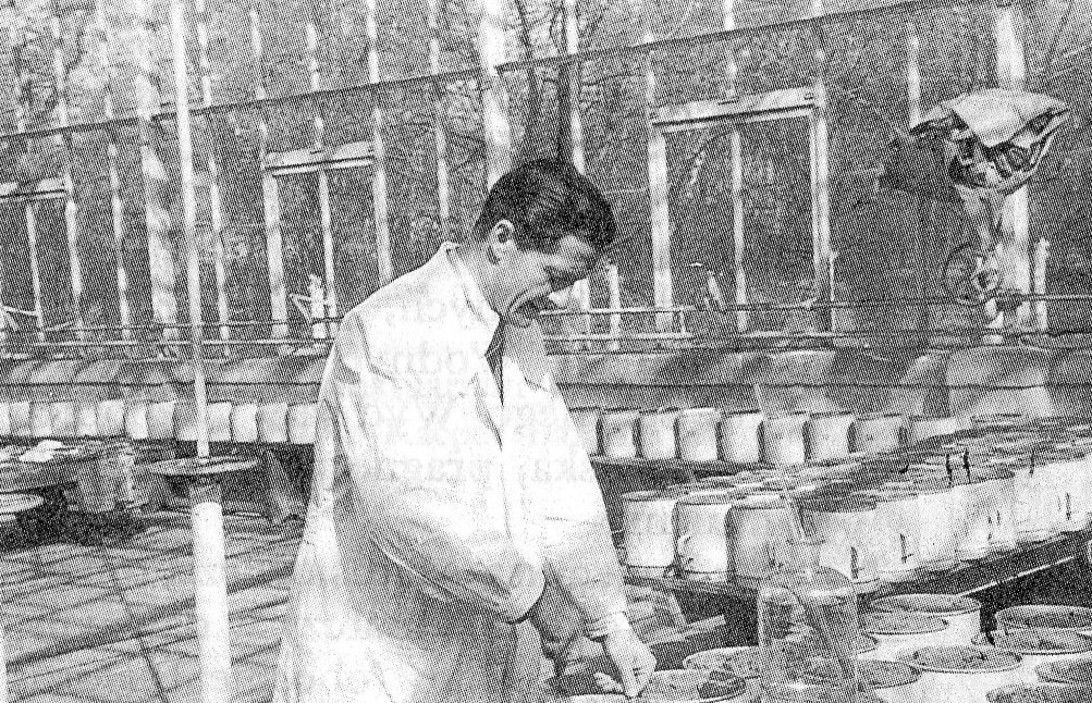 Prof. Eugeniusz Matusiewicz. AR Poznań.